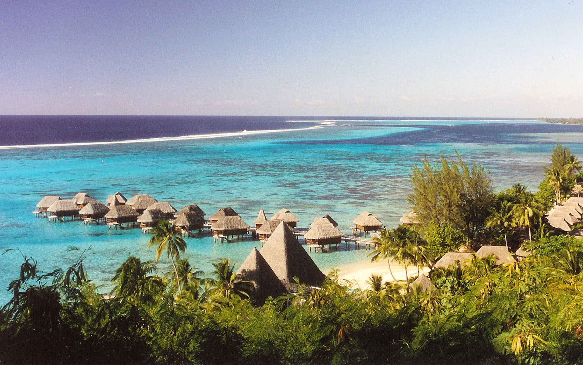 Lagon de la plage publique du Sofitel IaOra à Moorea Photo personnelle